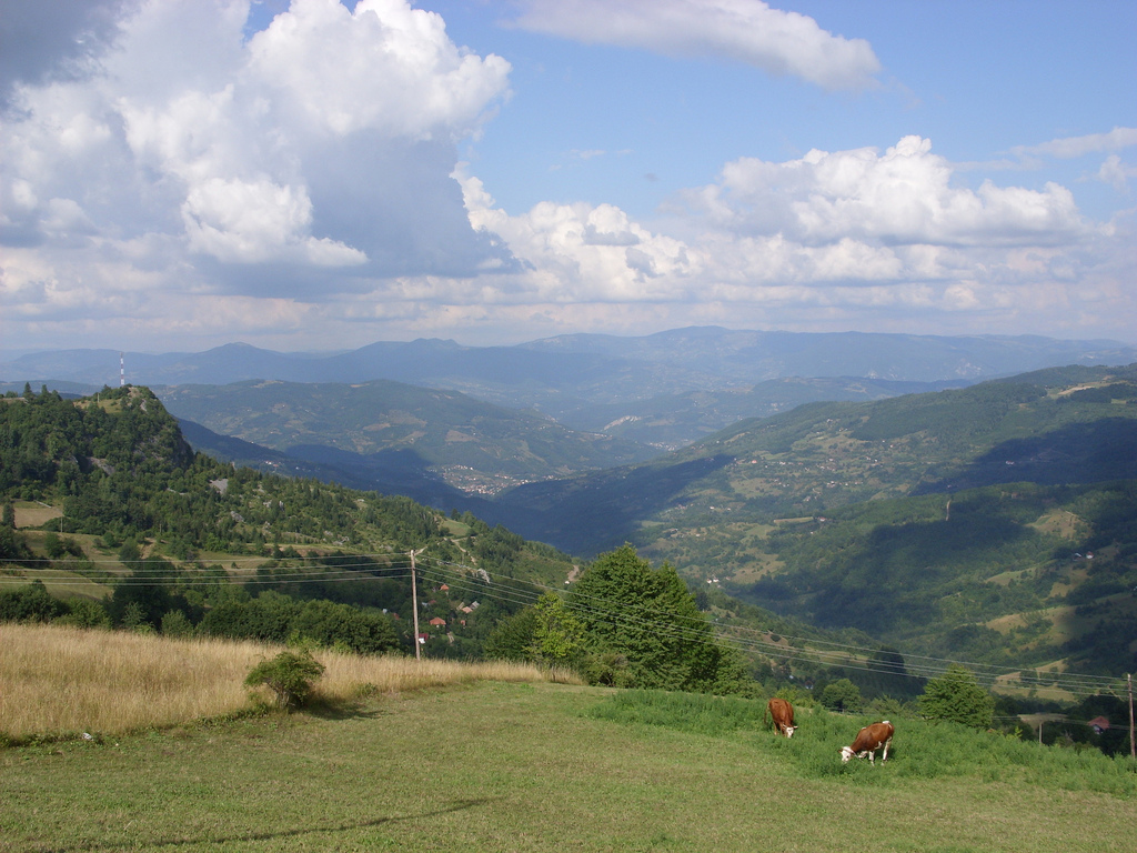 Blick über Montenegro